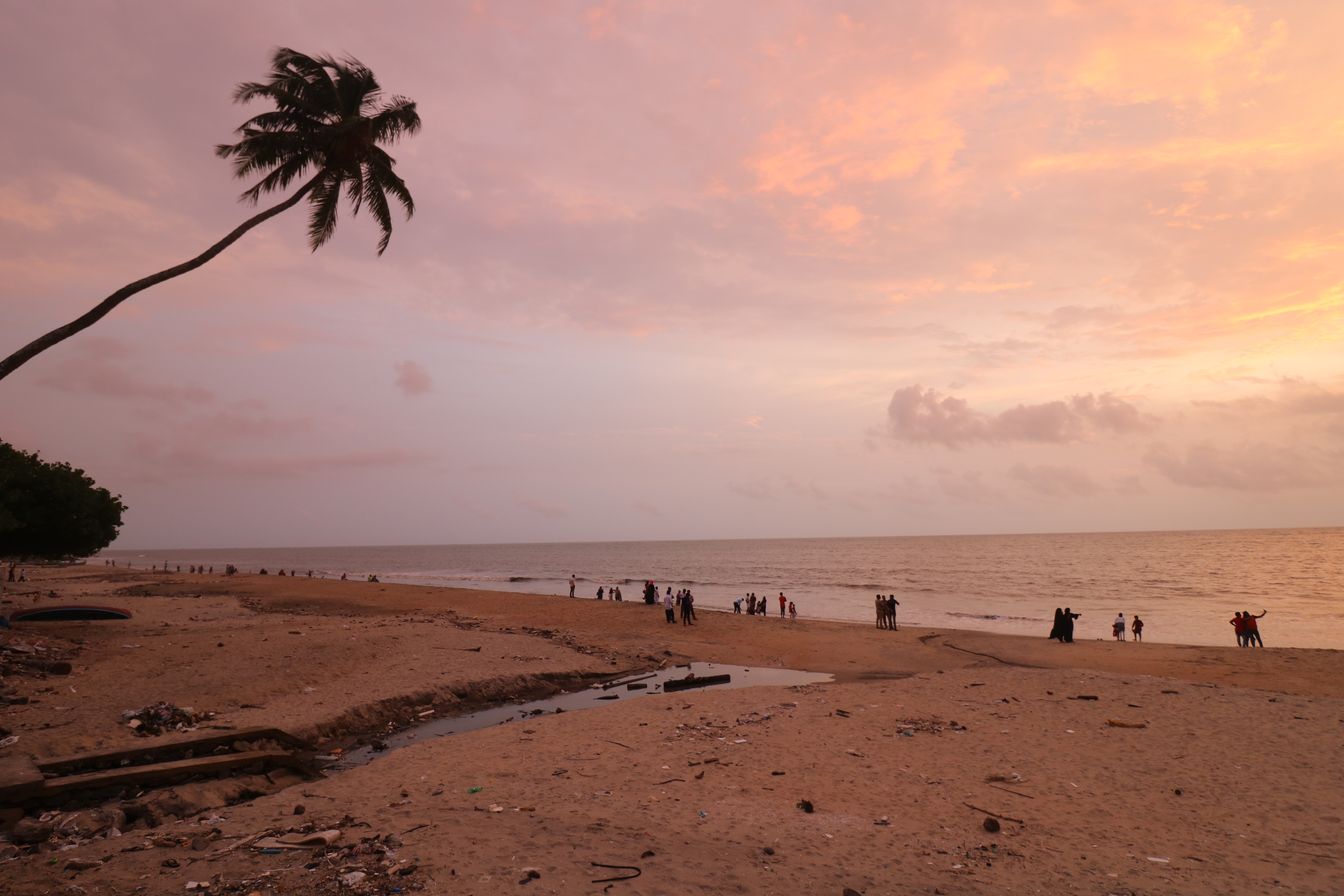 കോഴിക്കോട് ജില്ലയിലെ പ്രധാനപ്പെട്ട ബീച്ചുകളിലൊന്നാണ് കോഴിക്കോട് സൗത്ത് ബീച്ച്